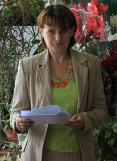 Вчитель математики